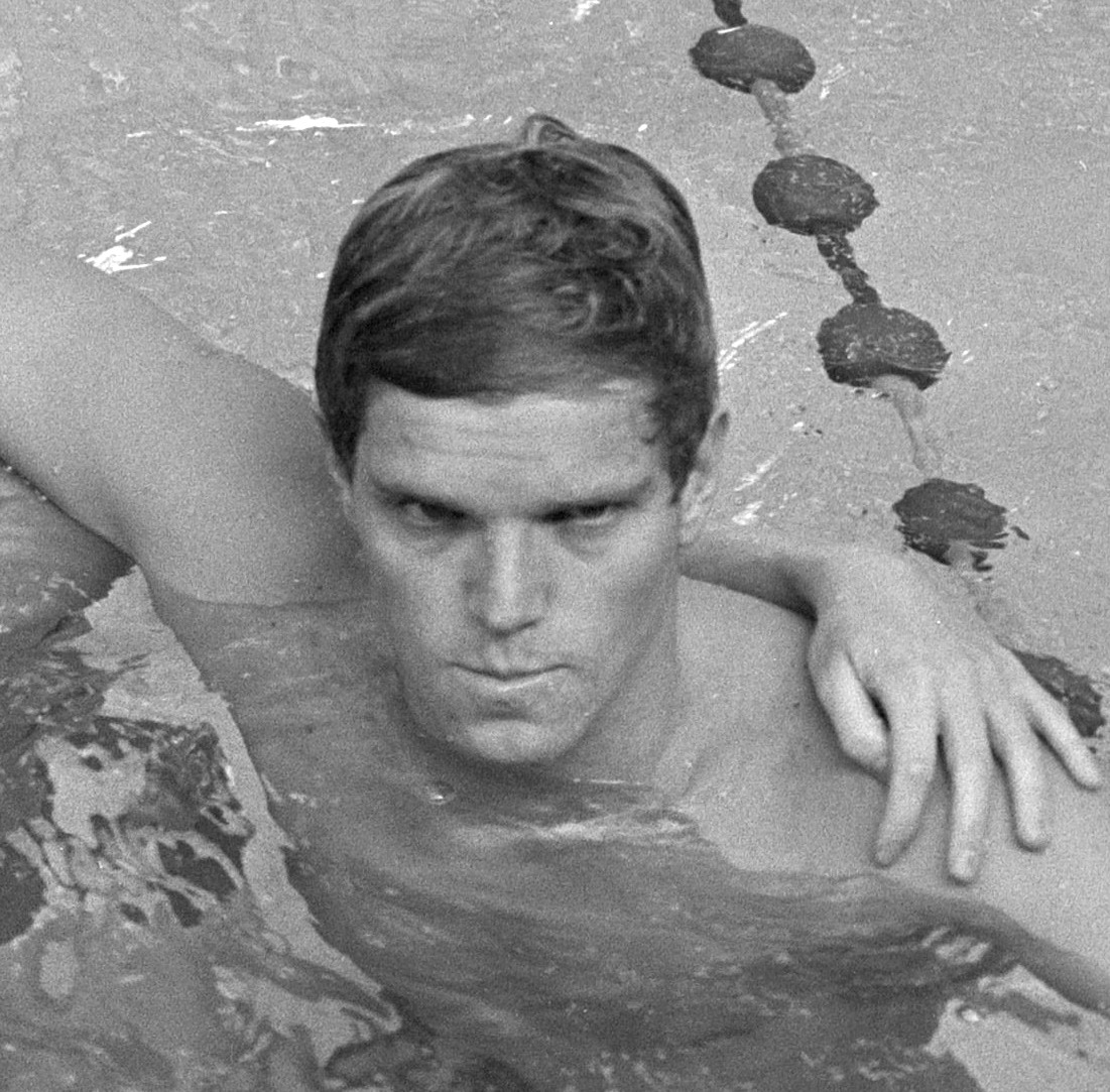 Eurovisie-zeslandenzwemtoernooi te Bussum, Sven von Holst